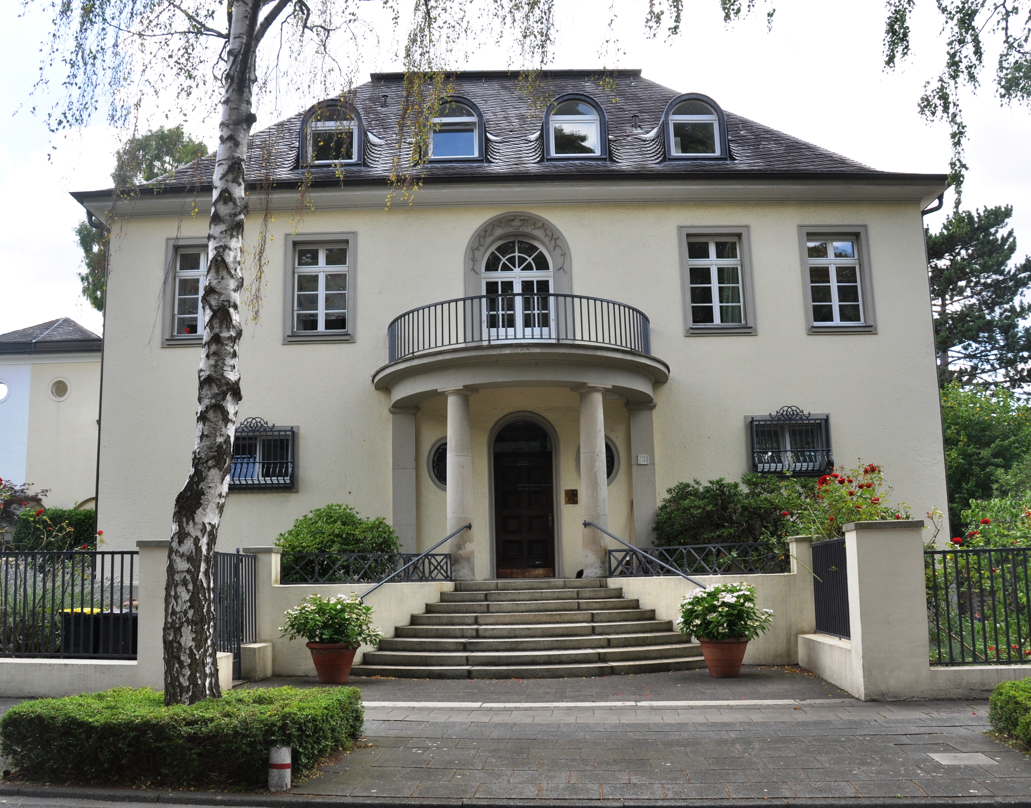 Architekt: Georg Falck; Teil einer Villengruppe,1922–1924 This is a photograph of an architectural monument.